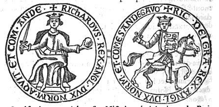 Richard Lví srdce